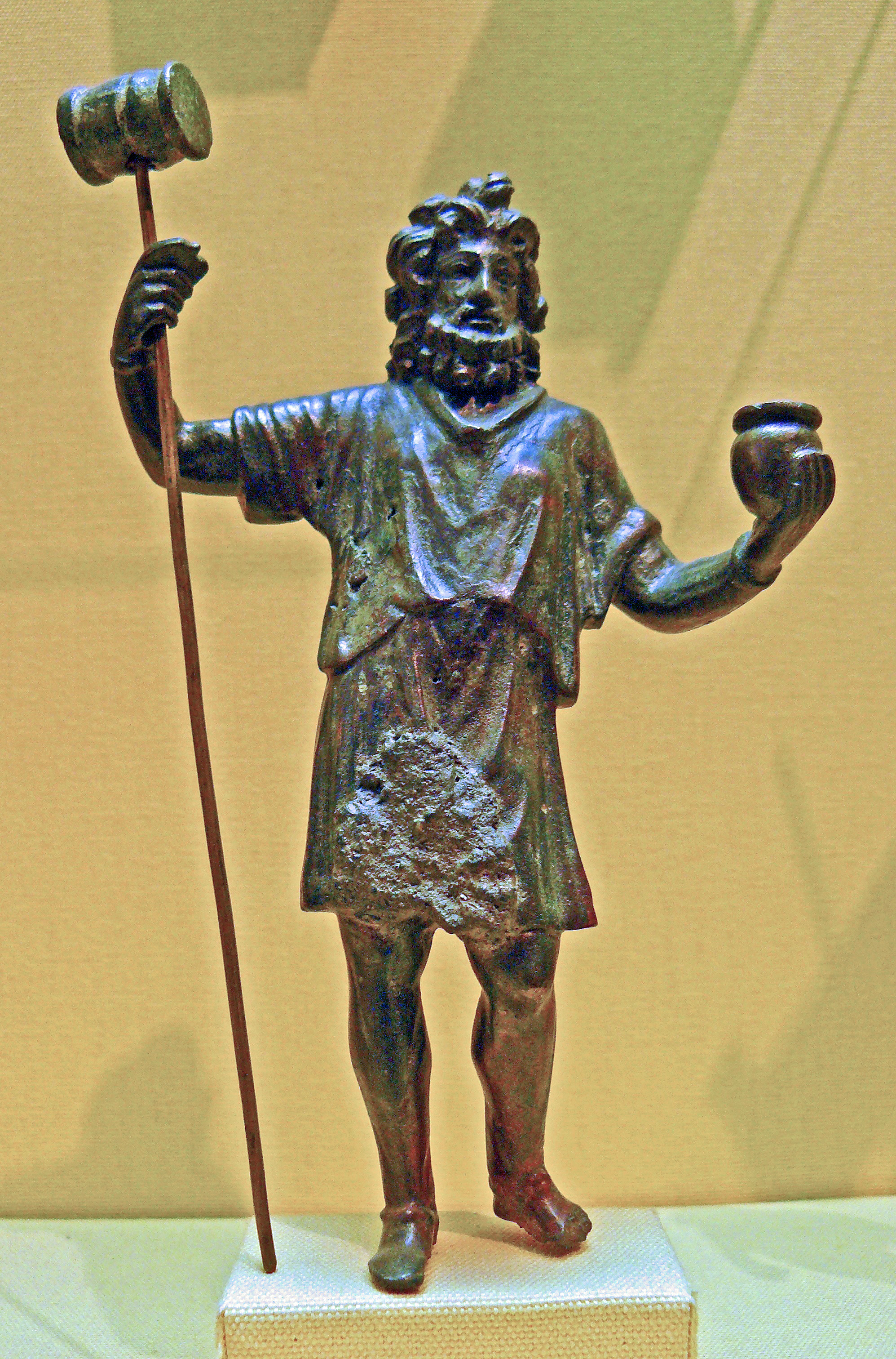 Statuette de Sucellus, dieu gaulois - Sauvat, Tour-sur-Rhône, Bouches-du-Rhône, France - II ou III ème siècle ap. J.C. - bronze env. 15 cm. - M.A.N. St-Germain-en-Laye - Inv. n° 87371